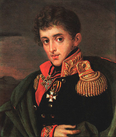 Alexander Alexeevich Tuchkov 4-th (1777-1812), Russian general in Napoleonic war, killed at Battle of Borodino А. Г. Варнек. Тучков (IV-й) музей-заповедник «Бородинское поле»